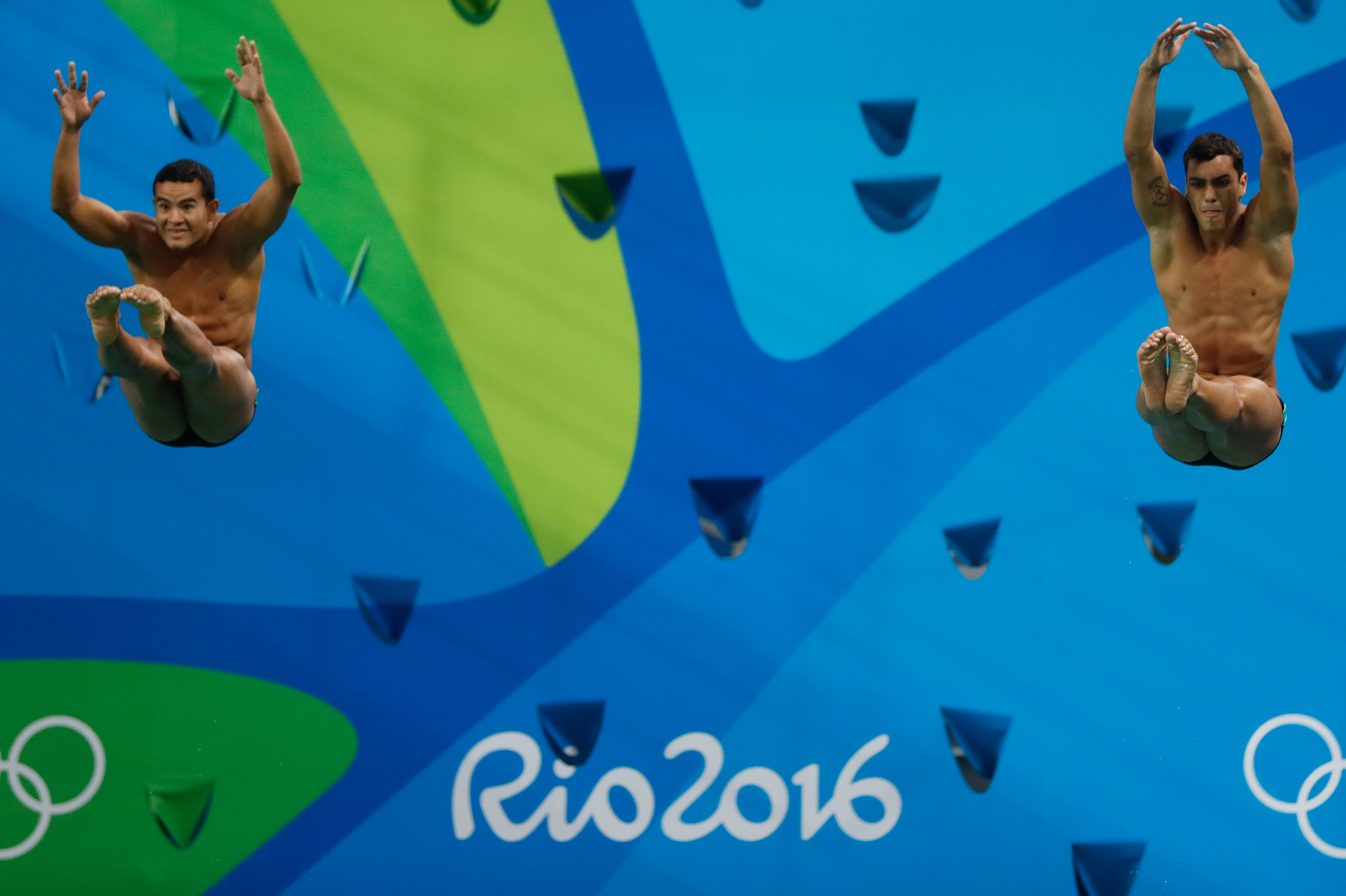 Rio de Janeiro - Dupla brasileira Ian Matos e Luiz Felipe Outerelo fica em 8º no trampolim de 3 metros sincronizado dos saltos ornamentais nos Jogos Rio 2016 no Parque Aquático Maria Lenk (Fernando Frazão/Agência Brasil)